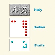 Comparative_Lettering_Hauy-Barbier-Braille.tif.jpg